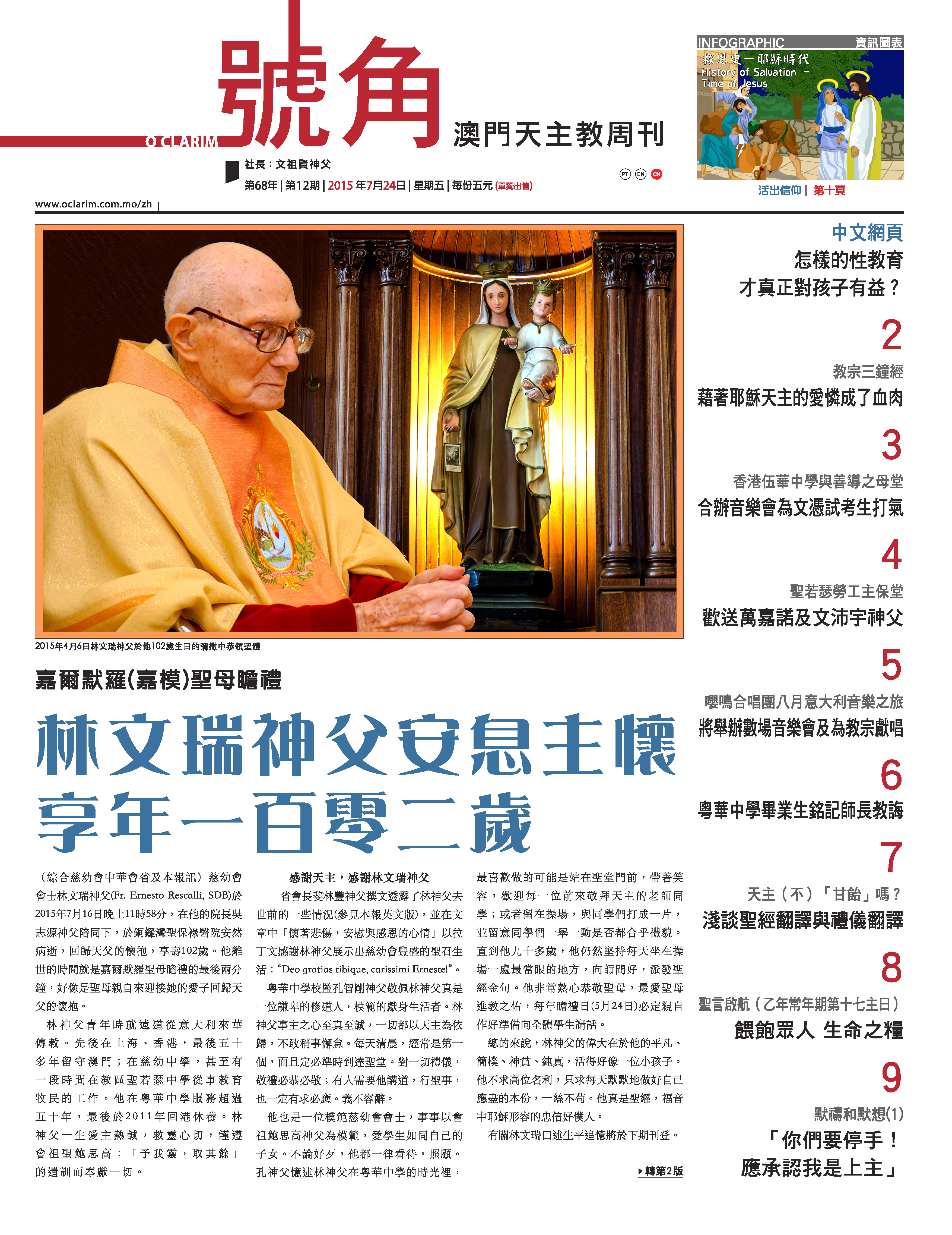 2015年7月24日頭版